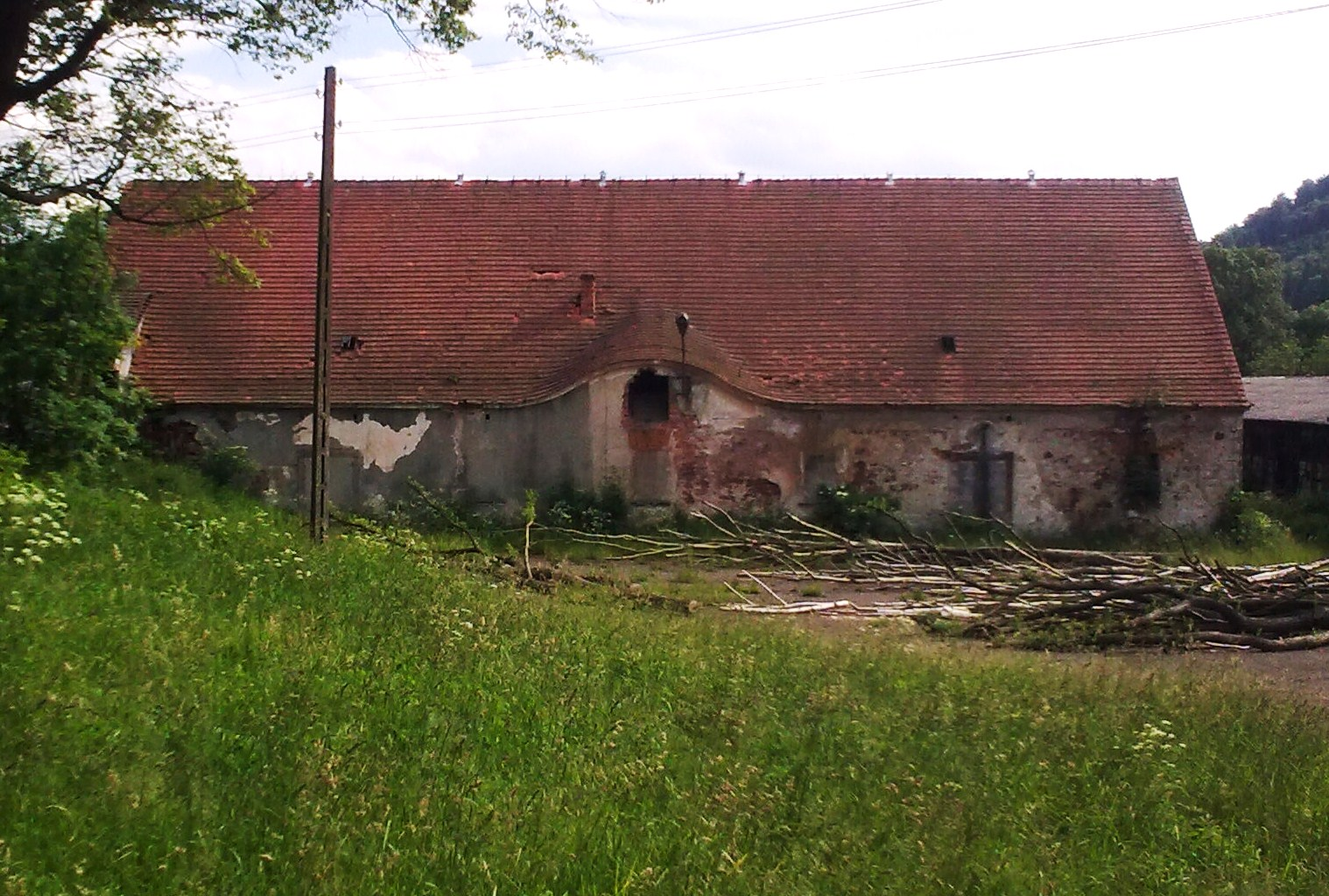 Włodowice, dwór